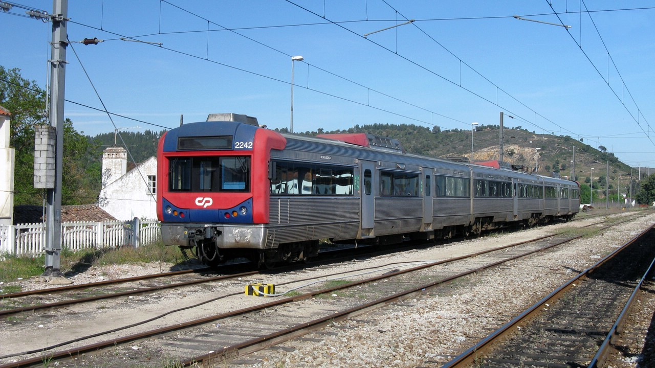 04 / Abr / 2009